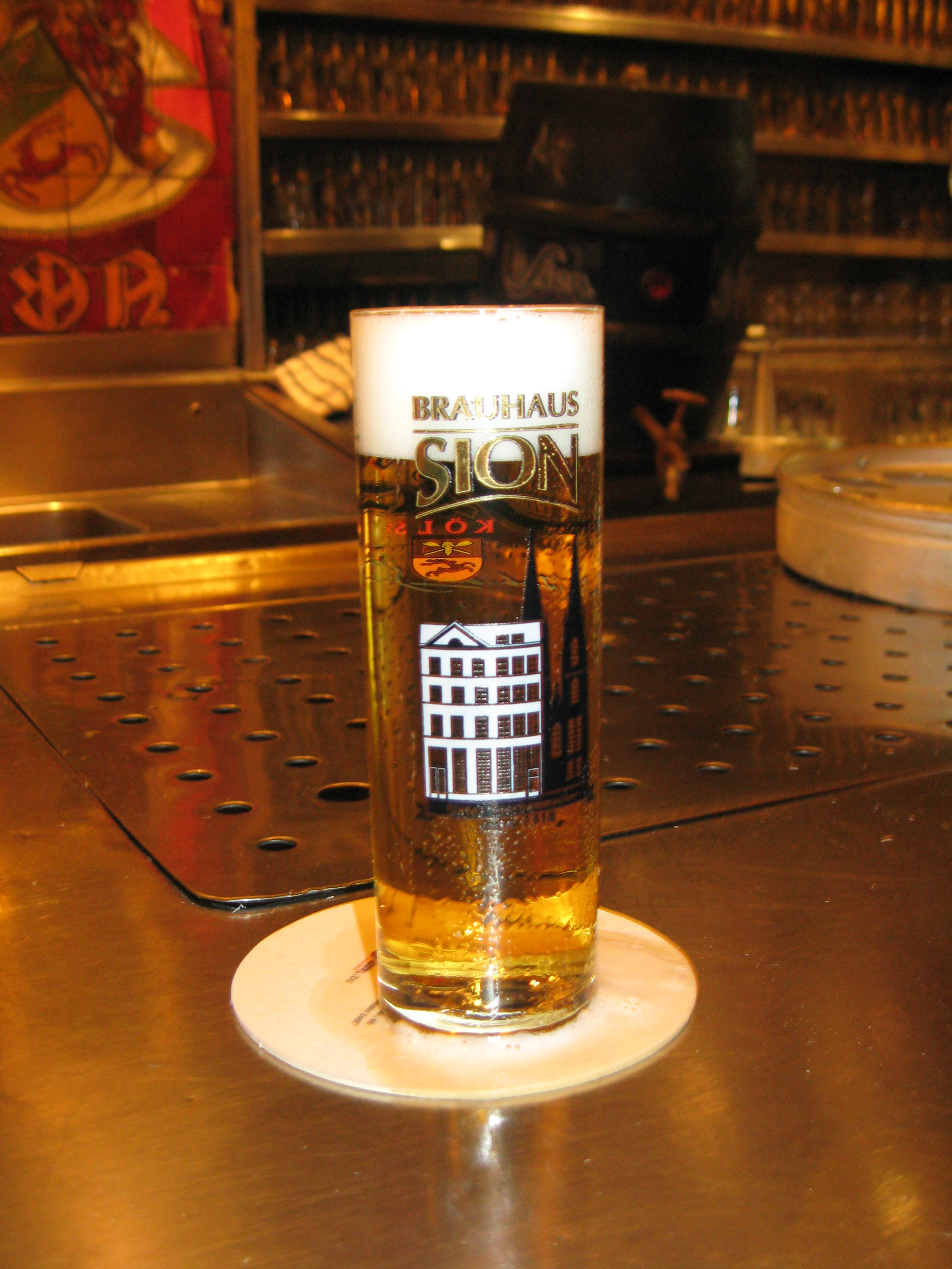 Brauhaus Sion, Kölsch, Köln, (Alter Markt) Datum: 02.03.2011 Urheber M. Pfeiffer alias Benutzer:Gordito1869 Quelle: privates Fotoarchiv des Urhebers